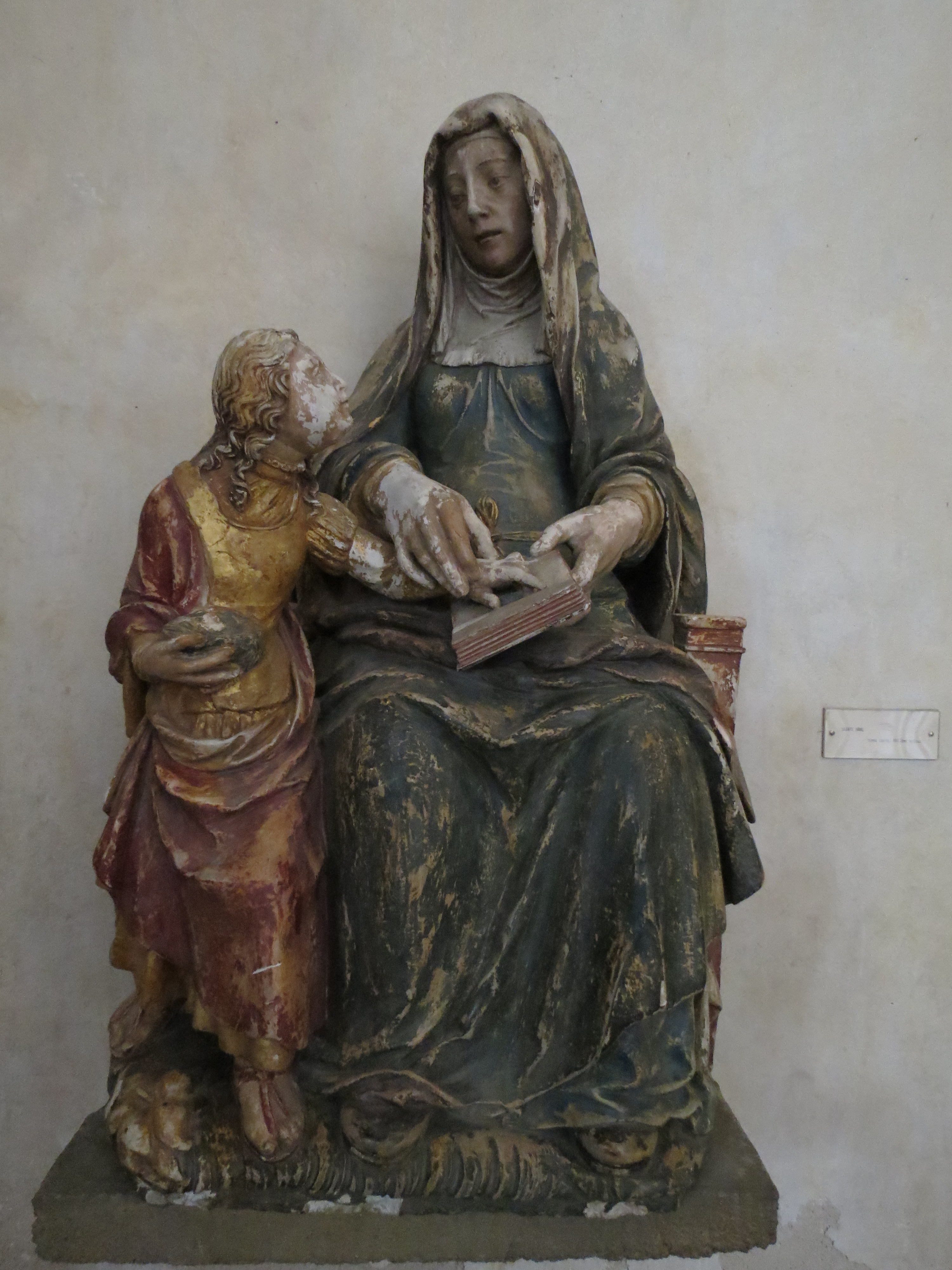 Cathédrale de la Sainte-Trinité de Laval, Laval, Mayenne, Pays de la Loire.